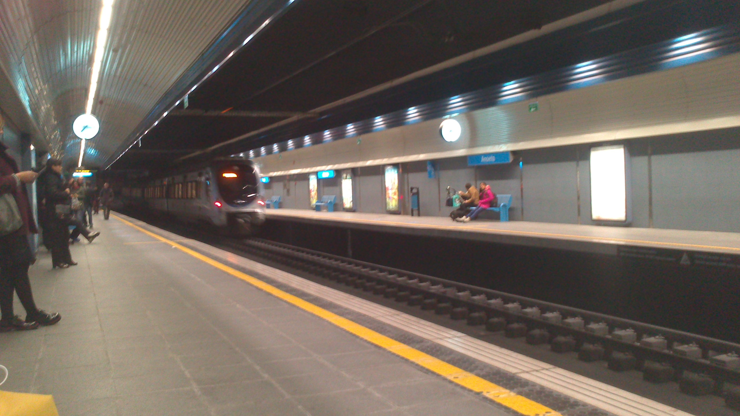 Metro Donostialdea saliendo de Anoeta hacia Amara